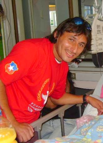 Delantero Club Palestino